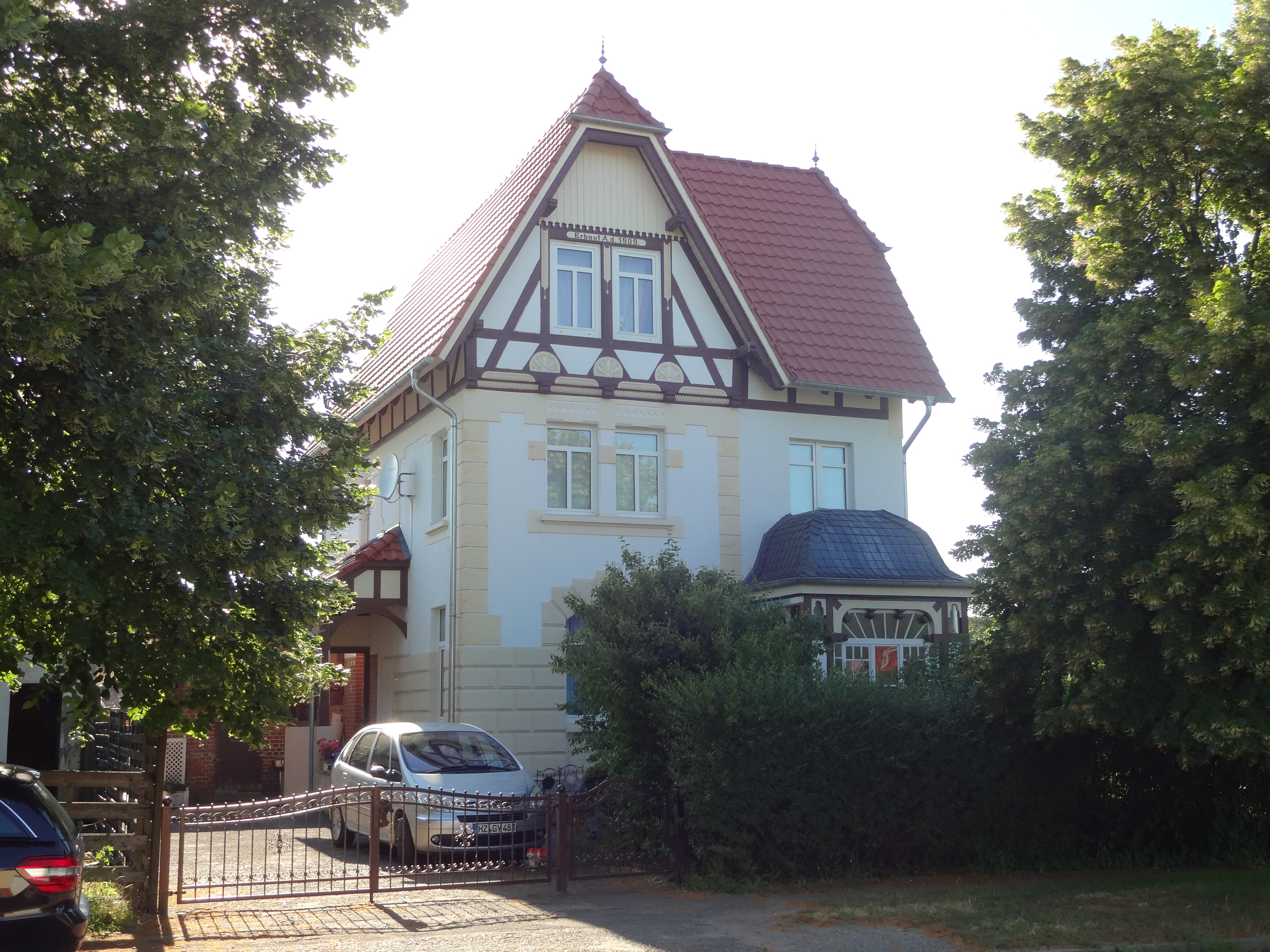 denkmalgeschütztes Wohnhaus in der Quedlinburger Straße 20 in Harsleben